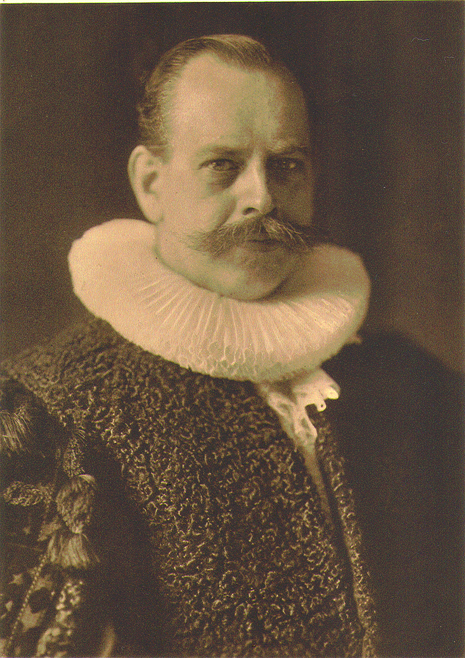 Carl August Schröder (1855–1945), Hamburger Bürgermeister